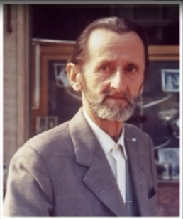 Giocondo Pillonetto (1910-1981).